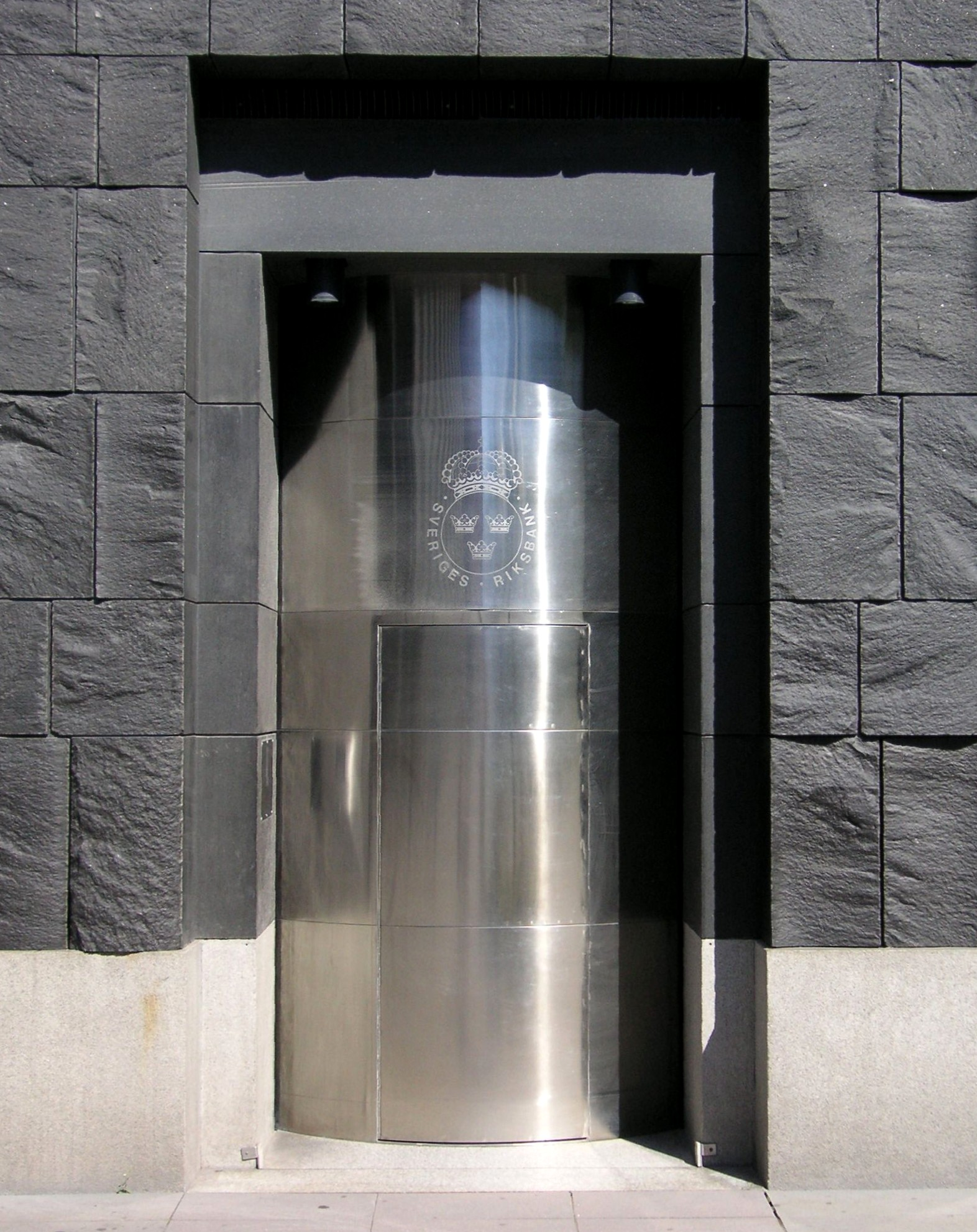 Riksbankshusets entré i Stockholm (stängd p.g.a helg)